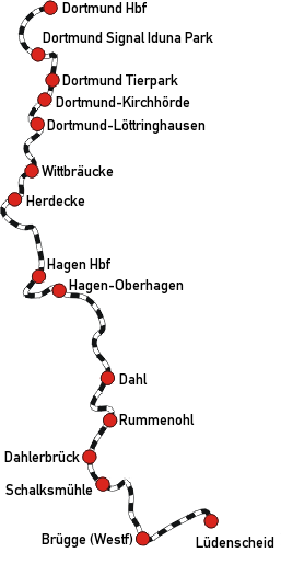 Streckenführung der Volmetalbahn